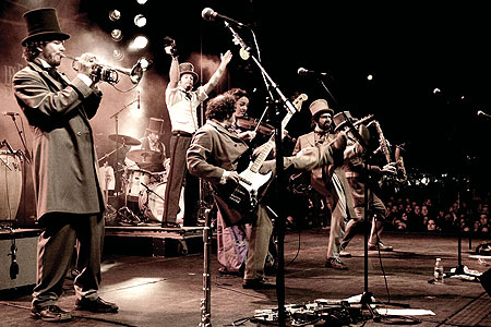 Mes Aïeux aux Francofolies de Montréal, le 29 juillet 2005